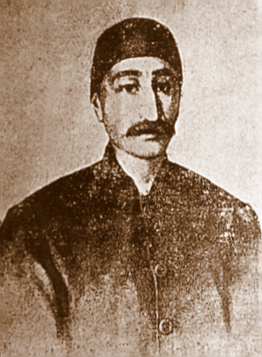 Garabet Amira Balyan'ın portresi